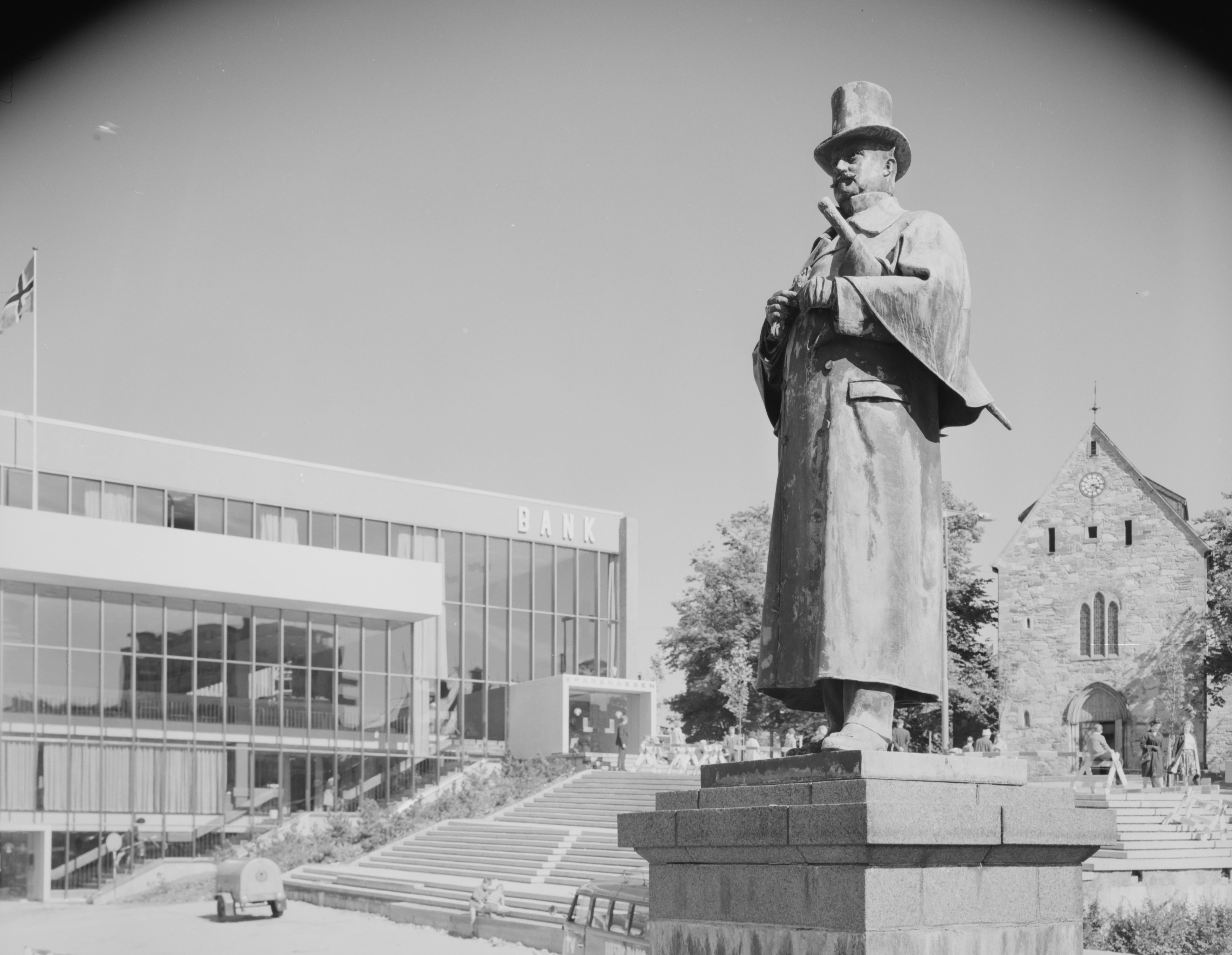 Bildet er hentet fra Nasjonalbibliotekets bildesamling Stavanger, Stavanger, Rogaland